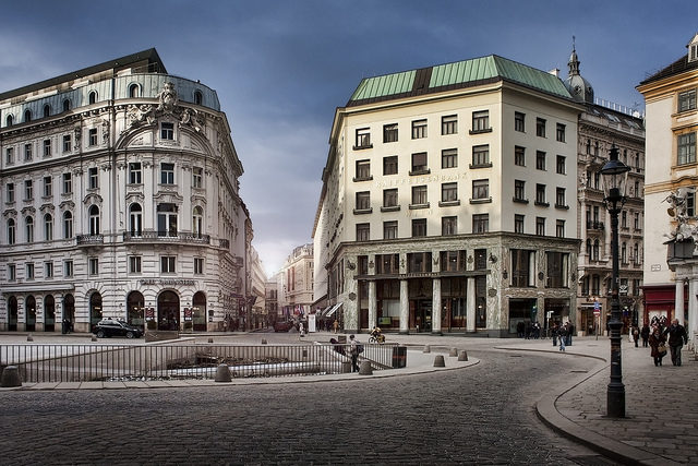 Der Michaelaplatz in Wien mit dem Looshaus und dem Palais Palais Herberstein